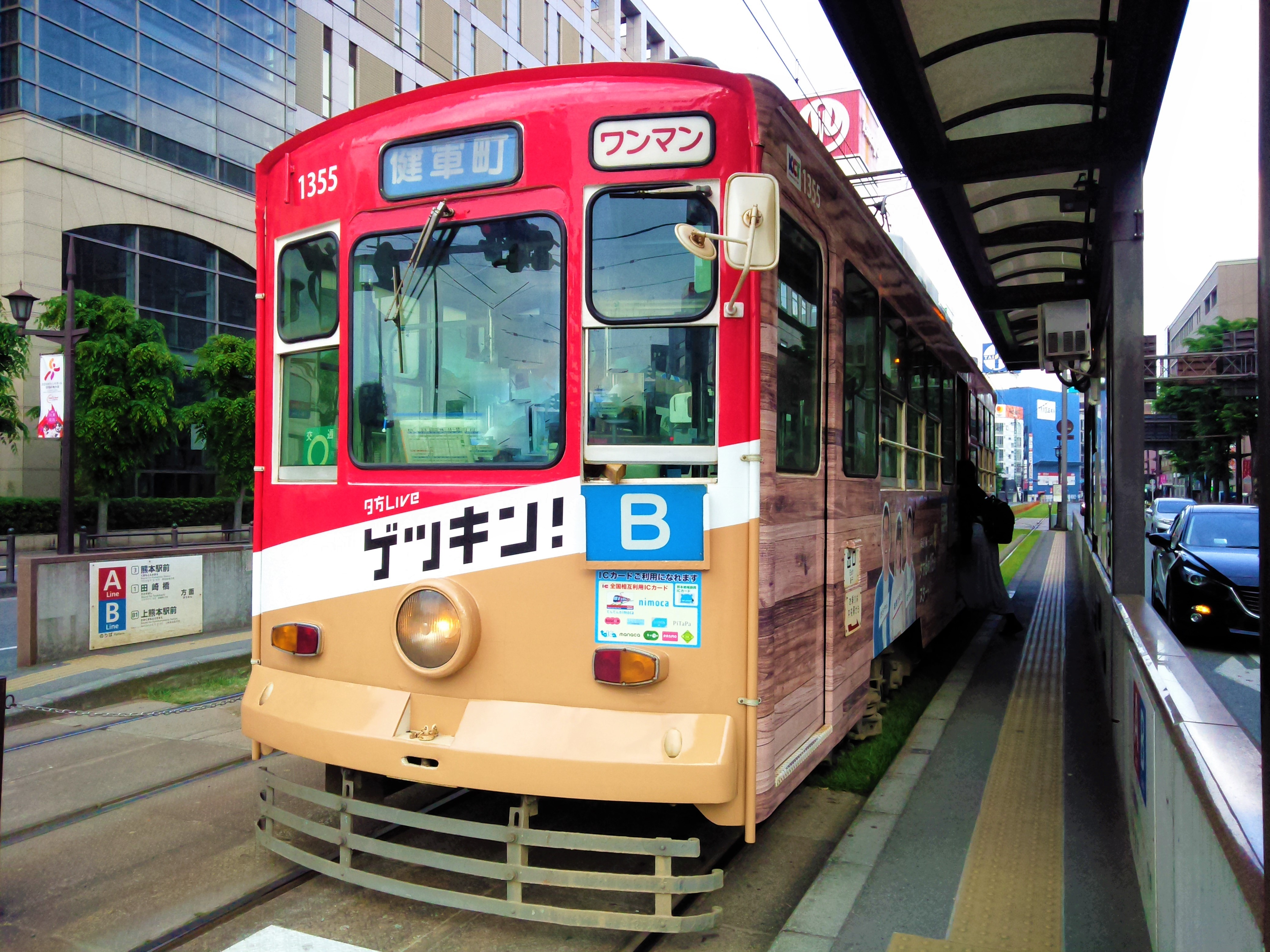 熊本市交通局1350型電車1355号。撮影当時は、熊本放送のテレビ番組「夕方LIVE ゲツキン!」の広告車になっていた